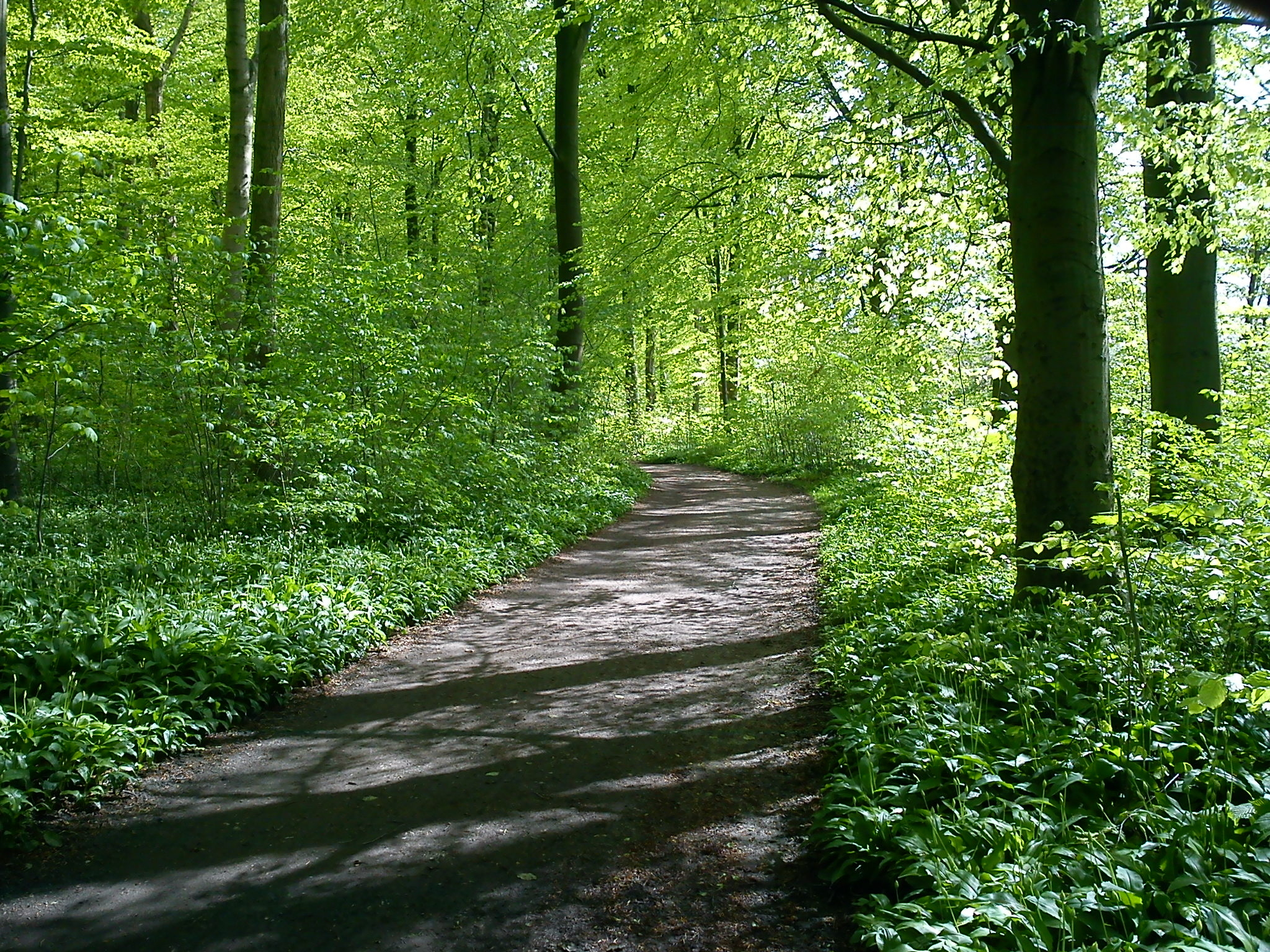 Maj i Riis Skov